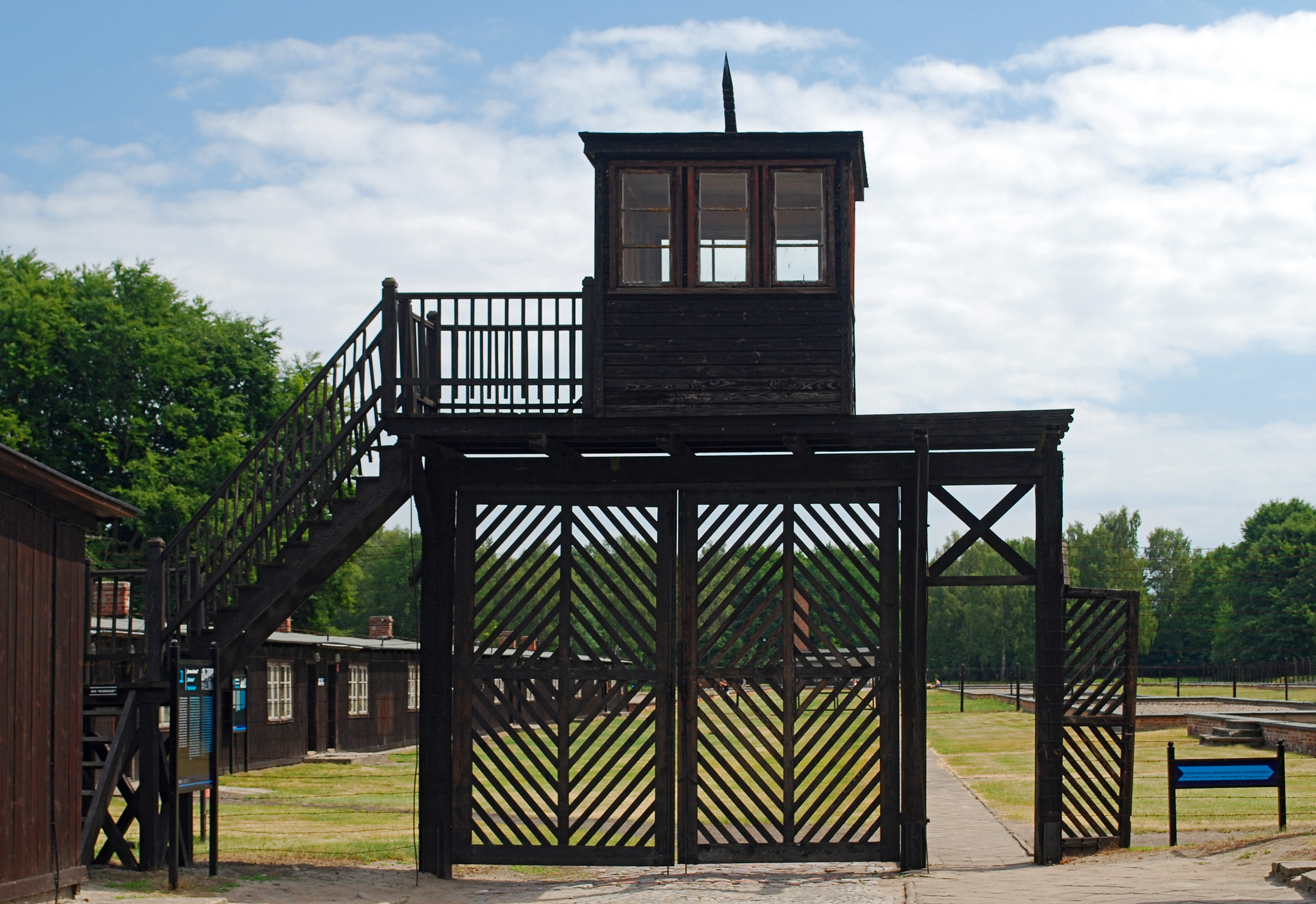 Brama śmierci w obozie KL Stutthof.